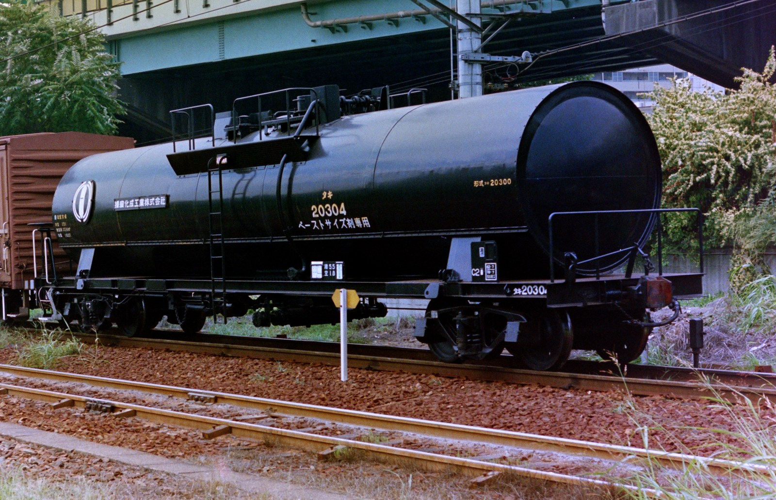 神戸港駅の国鉄私有貨車タキ20300形式タキ20304(播磨化成工業所有)